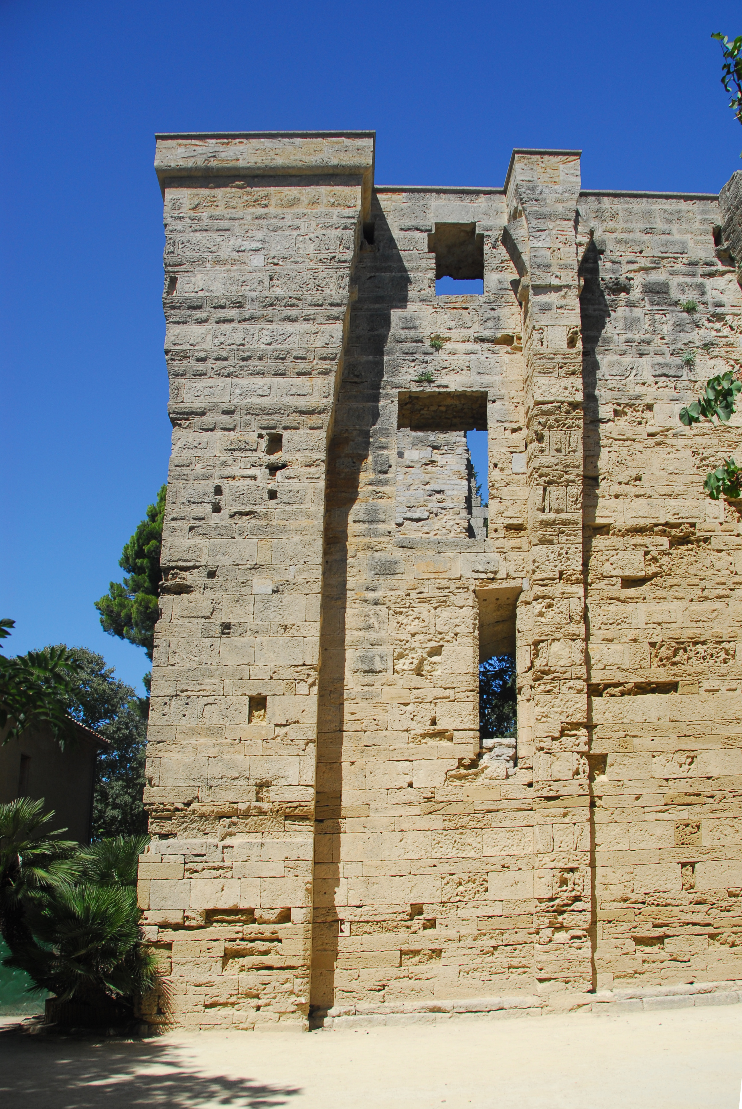 St-Pierre-et-St-Paul de Maguelone, Bischofsturm von S